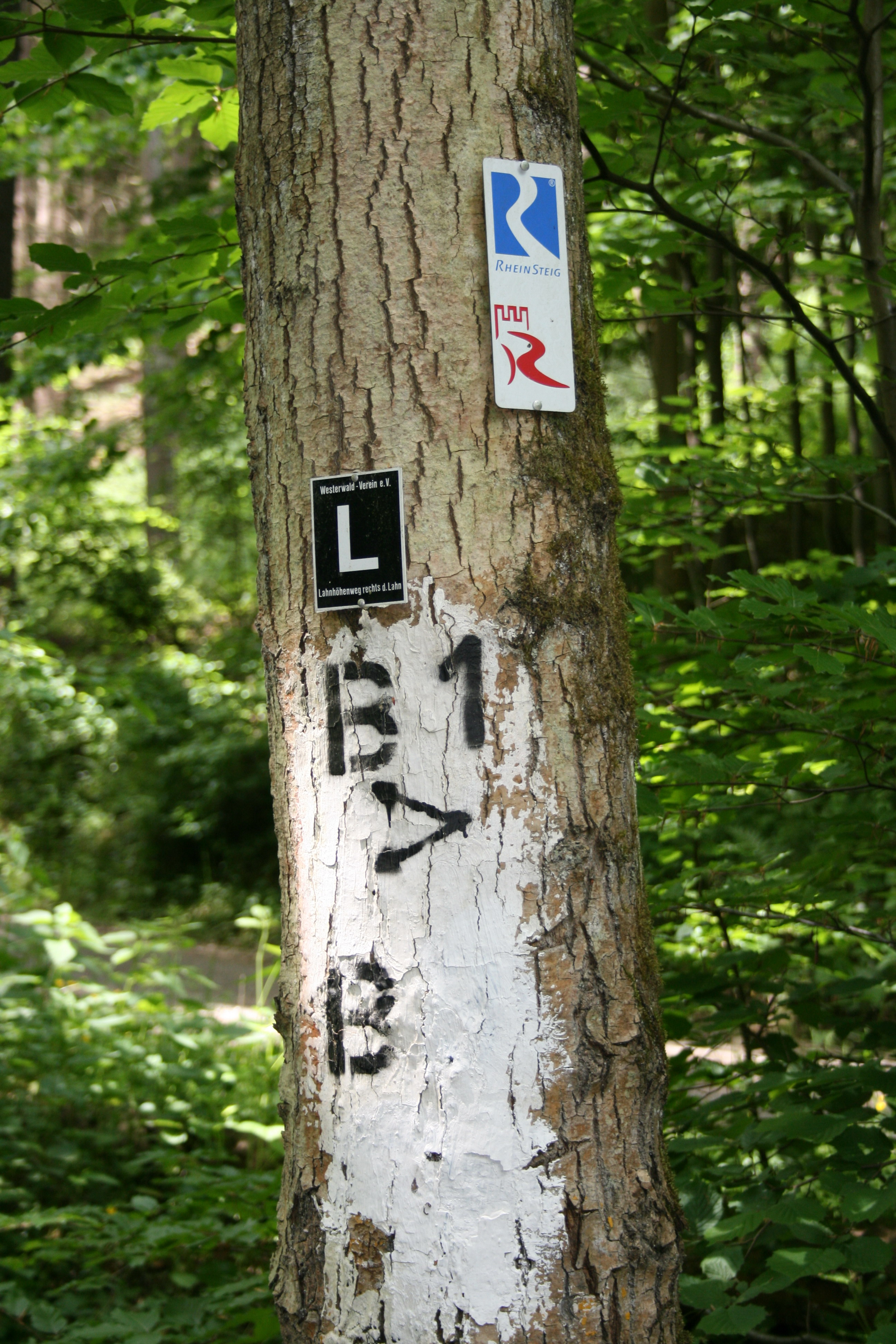 Deutschland, nahe Lahnstein: Wandermarkierungen auf dem Weg von der Bundesstraße zum Einstieg in die Ruppertsklamm: Rheinsteig, Rheinburgenweg, Lahnhöhenweg. Hinweis: seit 2010 führt der Rheinburgenweg nicht mehr dort vorbei; nun befindet er sich ausschließlich auf der linken Rheinseite.